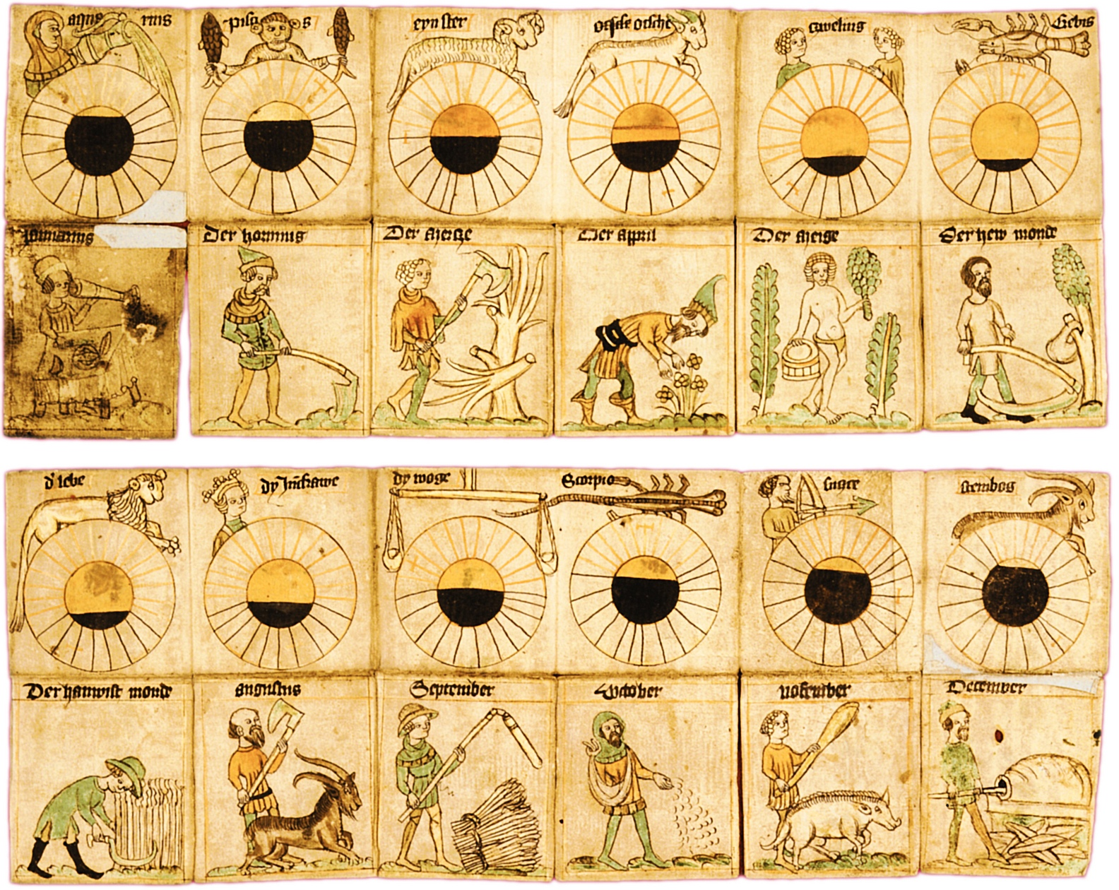 Faltkalender